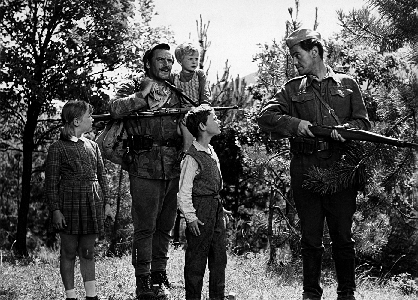 Prizor iz filma Ne joči, Peter iz leta 1964. Na sliki: Marjanca Mavec, Miha Derganc, Bert Sotlar, Bogdan Lubej, Lojze Rozman.